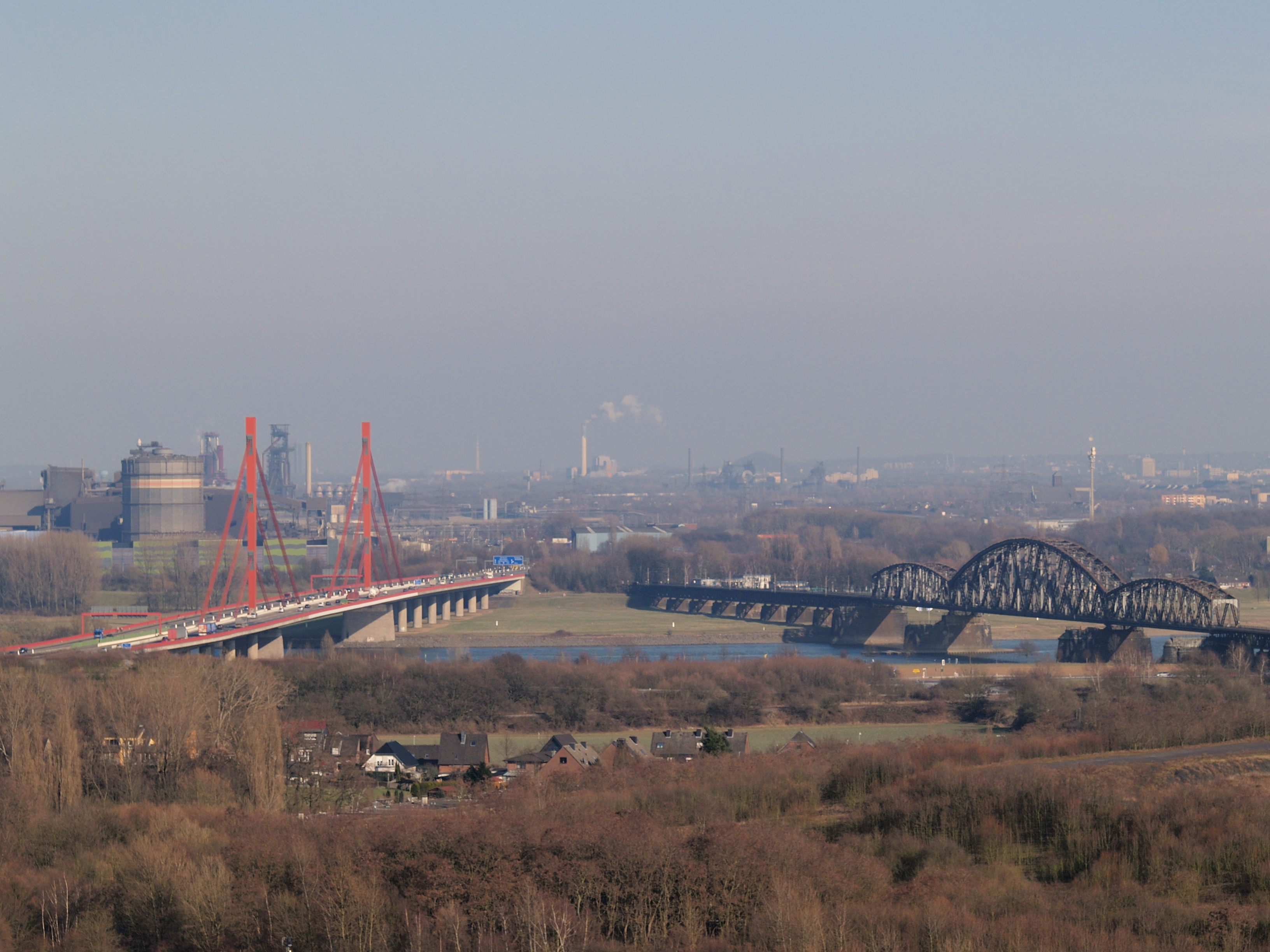 Blick von der Halde Rheinpreussen auf den Rhein mit den Brücken der Autobahn A42 links und der 'Haus Knipp Eisenbahnbrücke' rechts, sowie im Hintergrund den Industrieanlagen von ThyssenKrupp in Duisburg